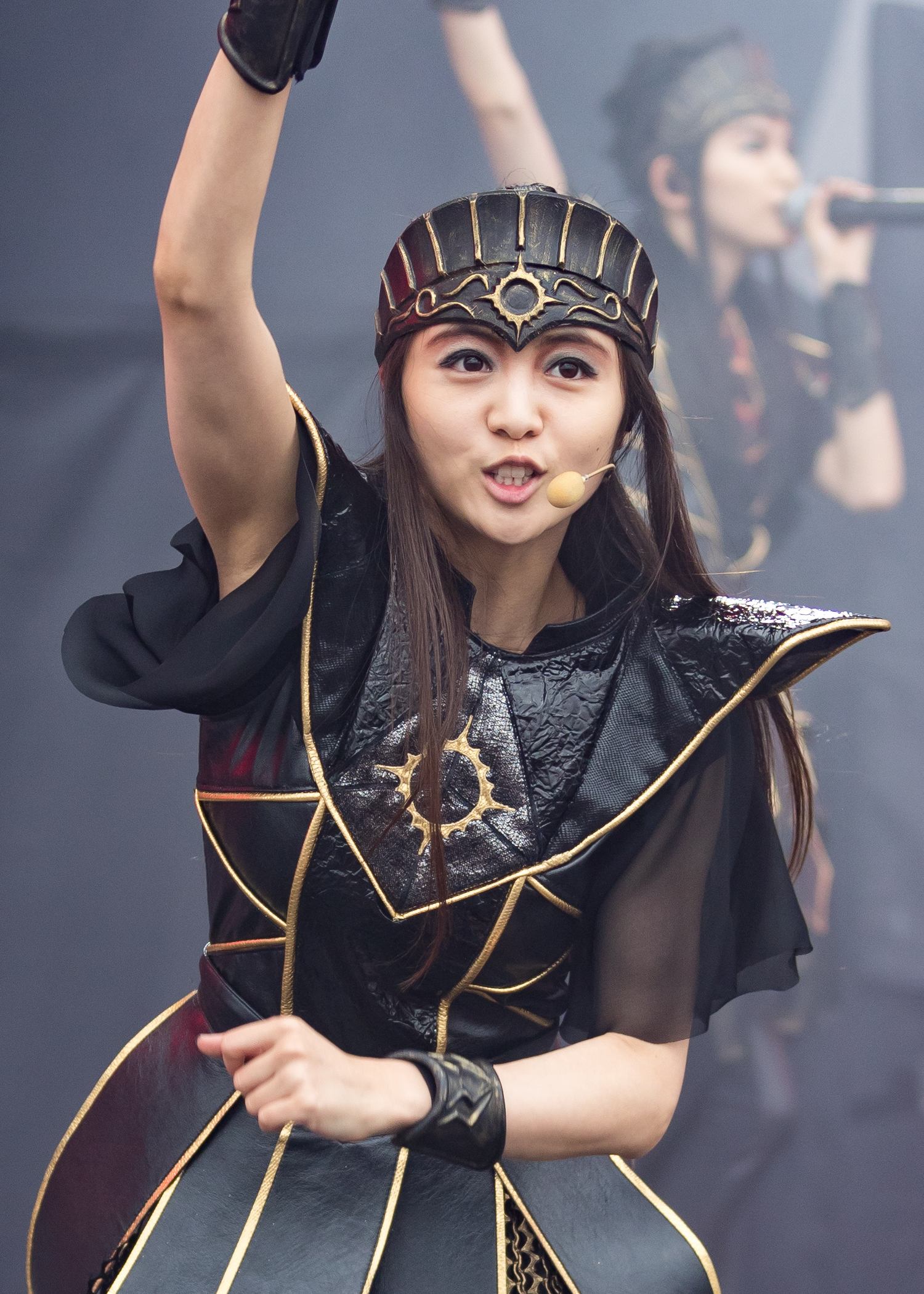 Babymetal @ Rock am Ring 2018